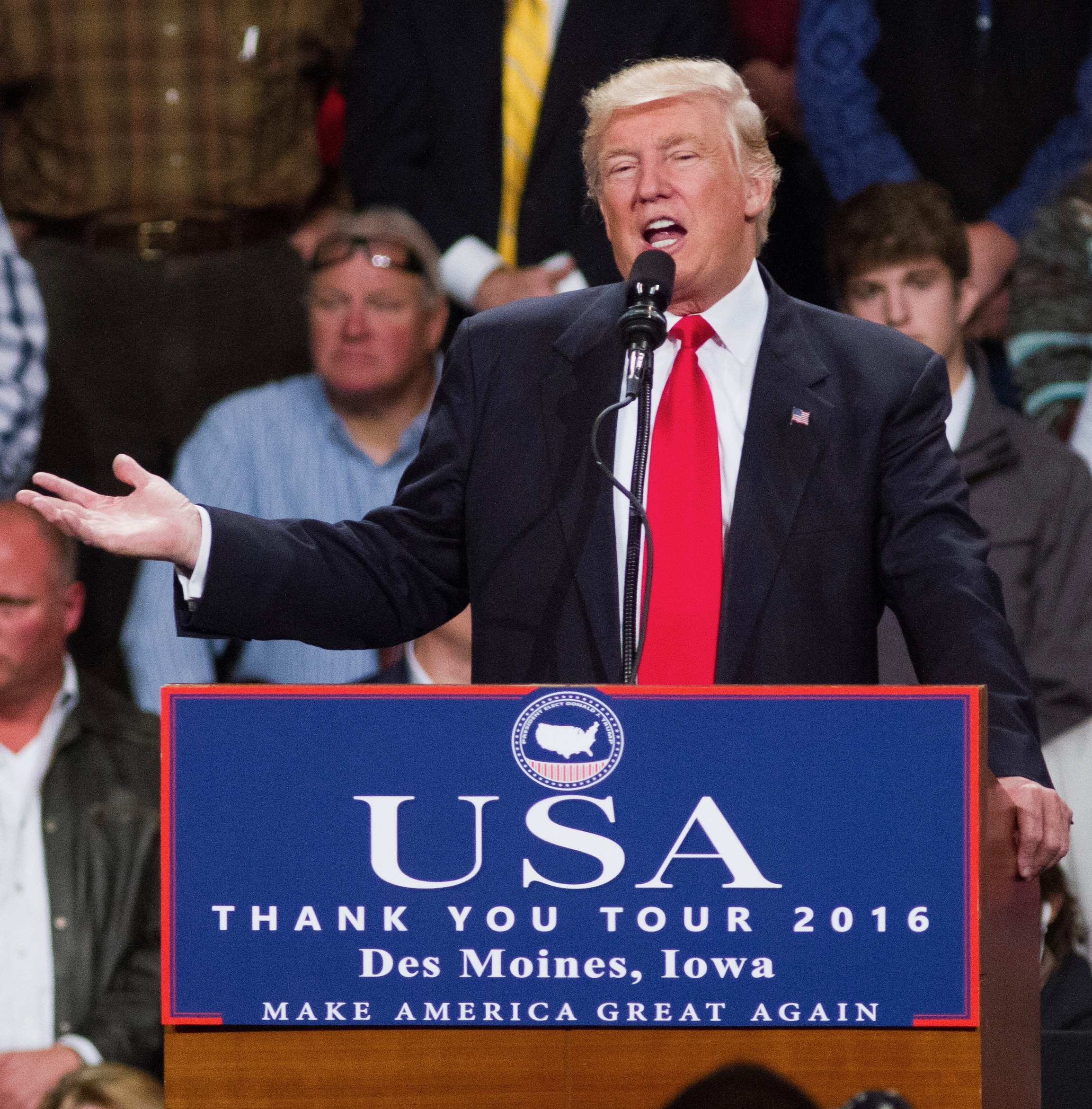 Trump (12/8)